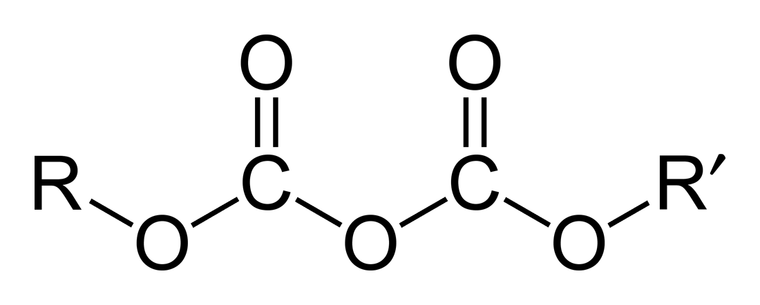 Structural formula of the general dicarbonate ester